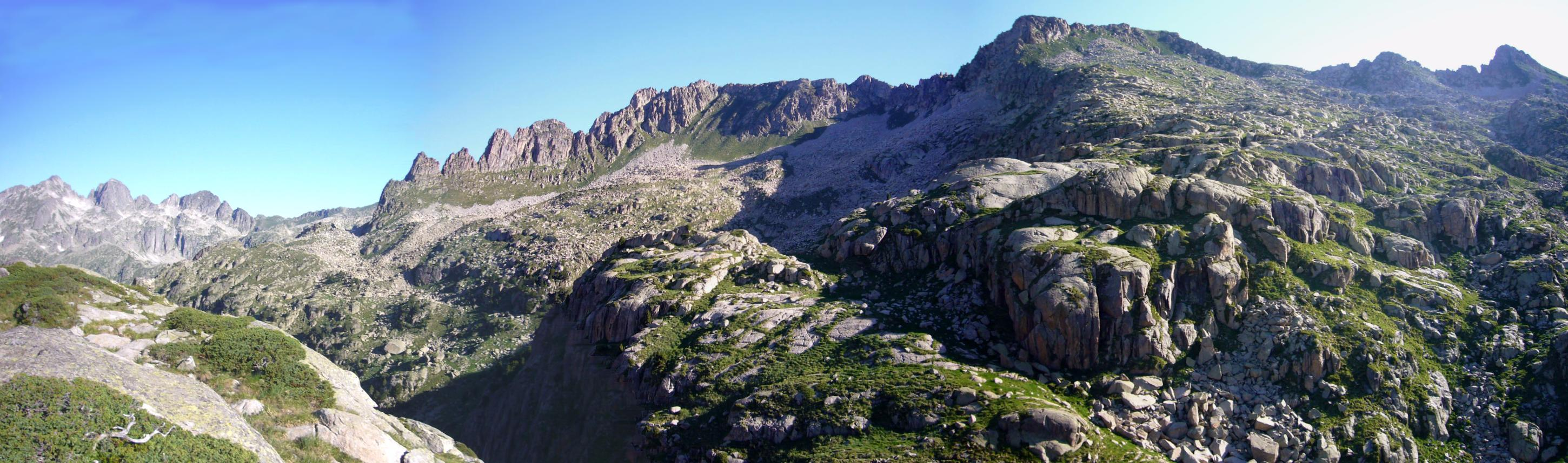 Cims Septentrionals de la Vall de Colieto; la Vall de Boí, Alta Ribagorça, Catalunya